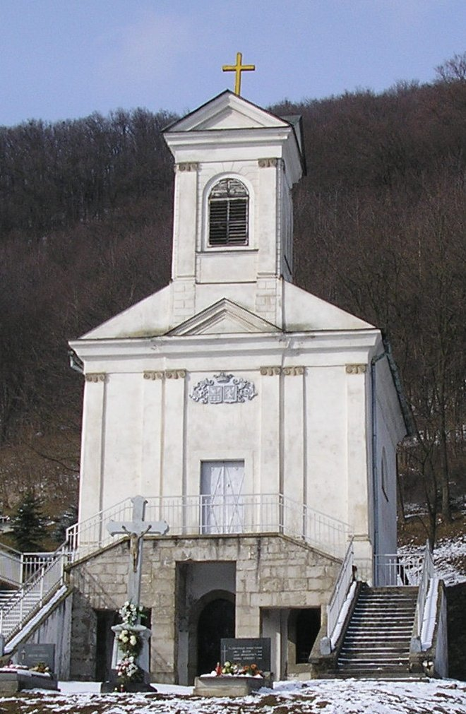 Fotka Kaplnky Sedembolestnej Panny Márie na cintoríne v Snine